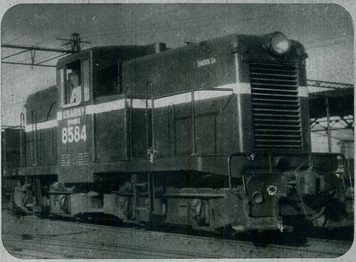 US ARMY8500形、後のDD12形ディーゼル機関車。品川駅で入換に使われていた。